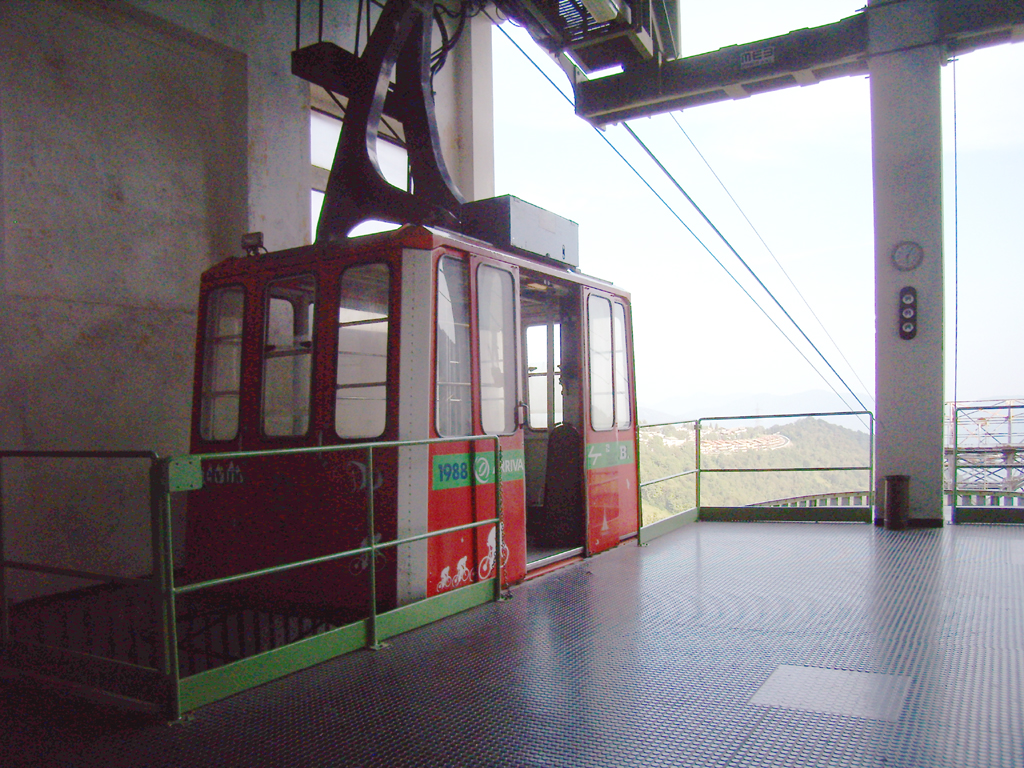 Funivia Albino-Selvino, cabina ferma alla stazione superiore (Selvino).